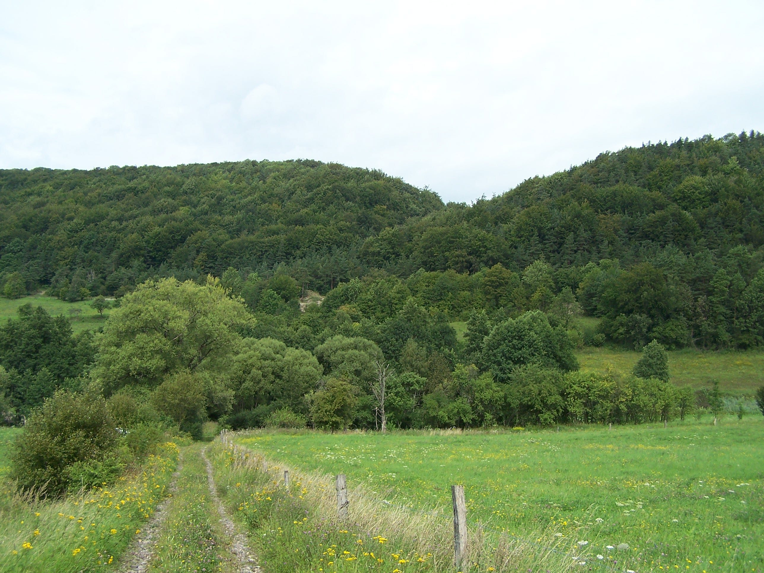 Der Burbacher Pass in den Hörselbergen - eine alte Straßenverbindung zwischen Hörsel- und Nessetal.